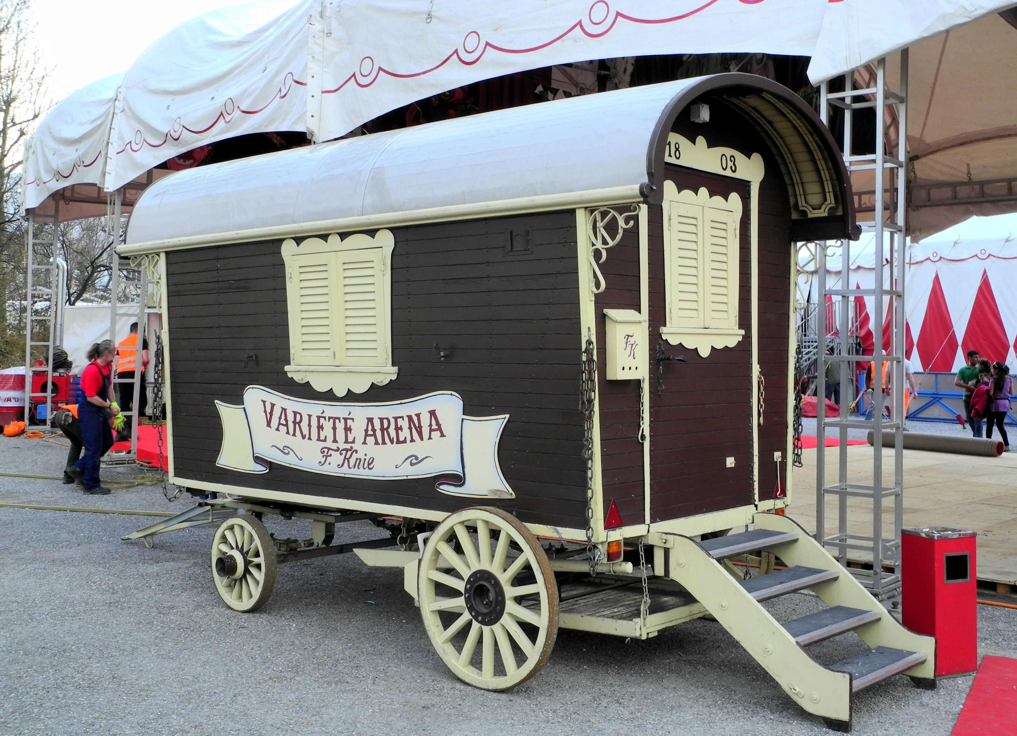 Circus Knie in Rapperswil (Switzerland)